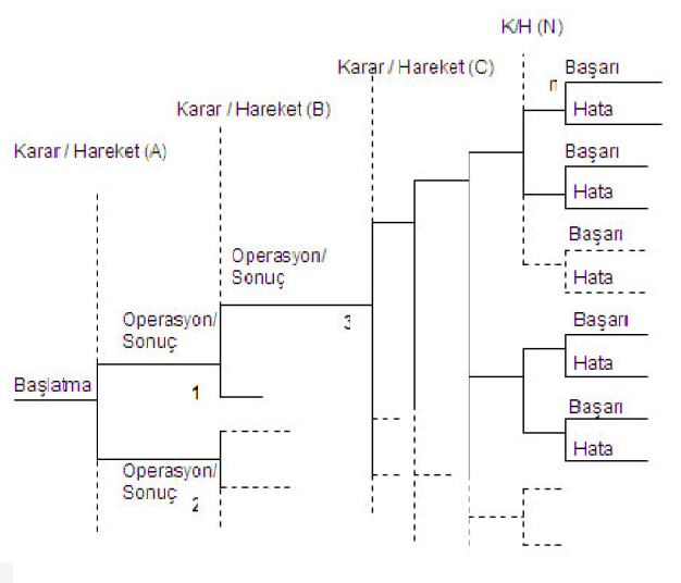 Olay Ağacı Analizi Uygulaması